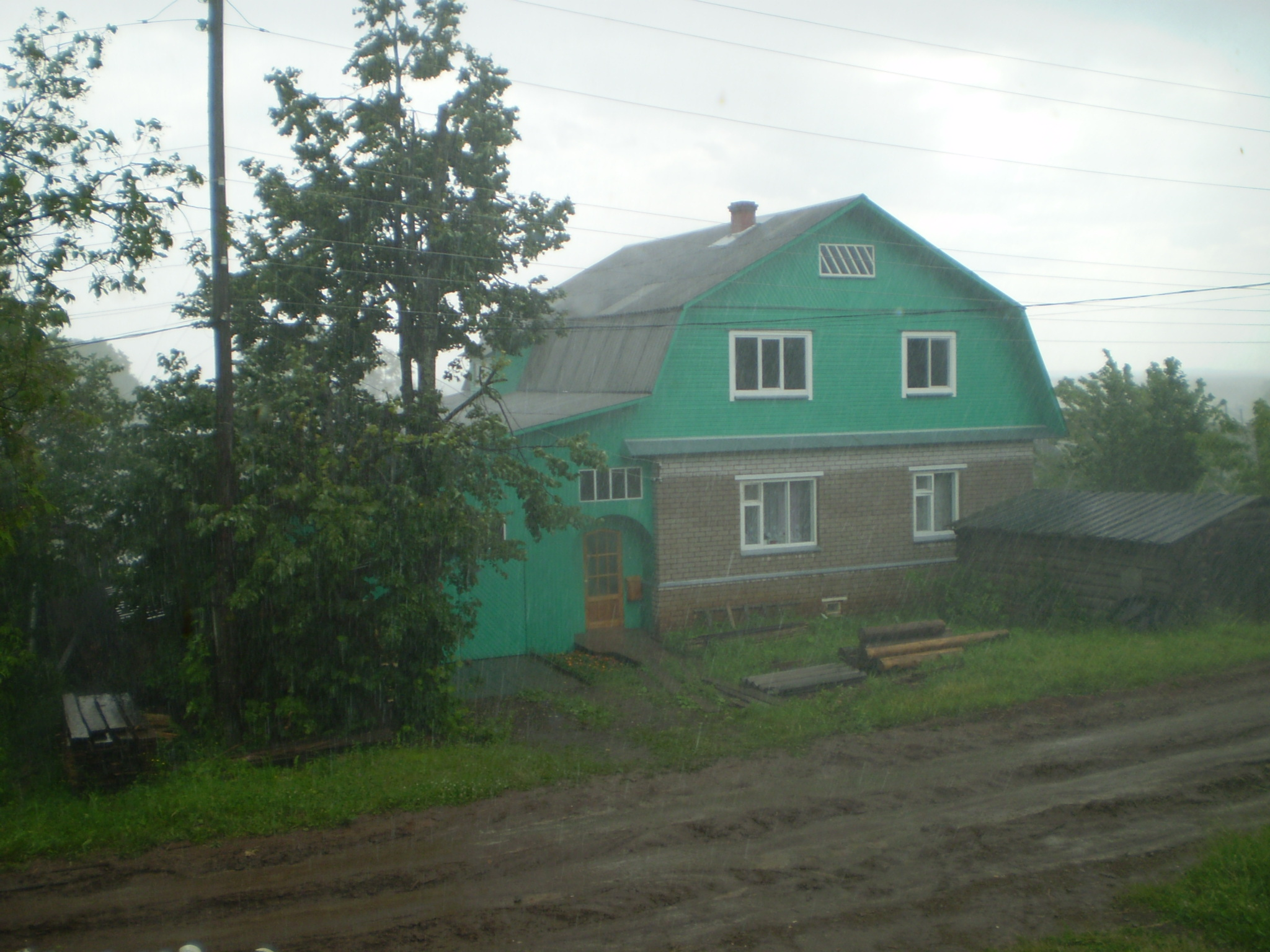 дождь